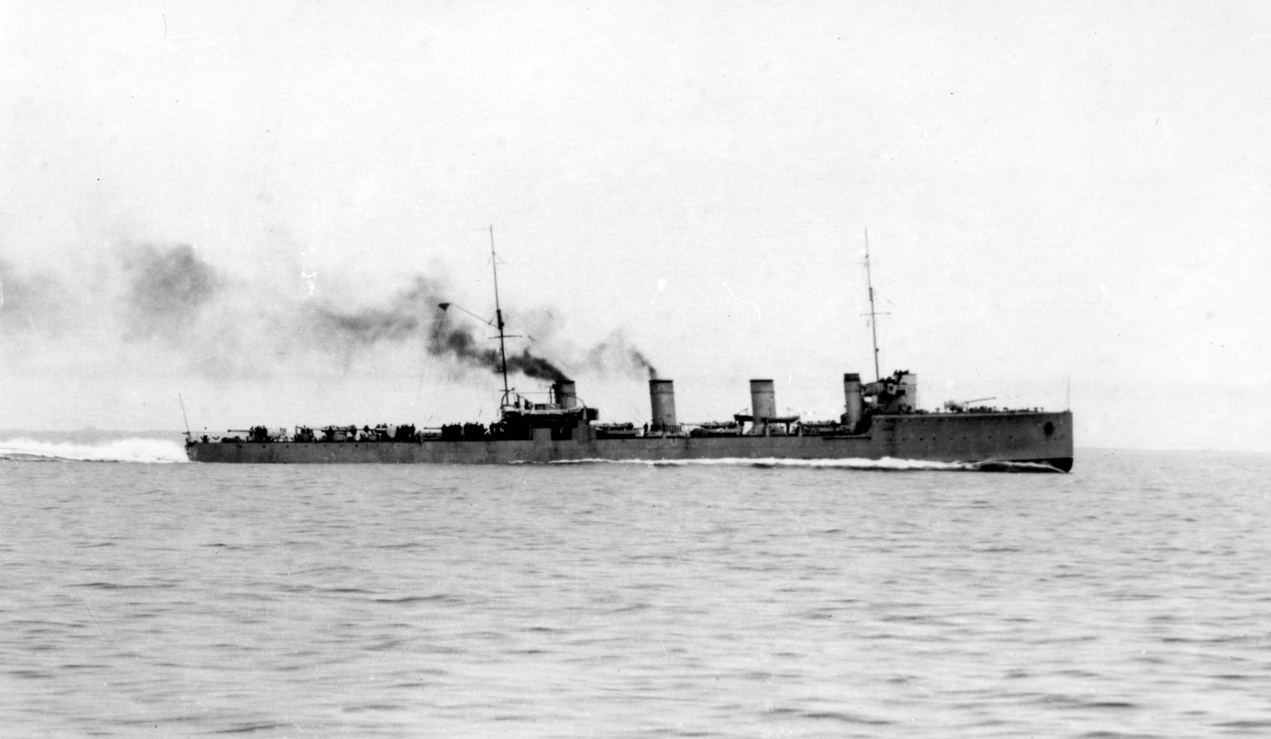 Imperial Russian destroyer Novik.